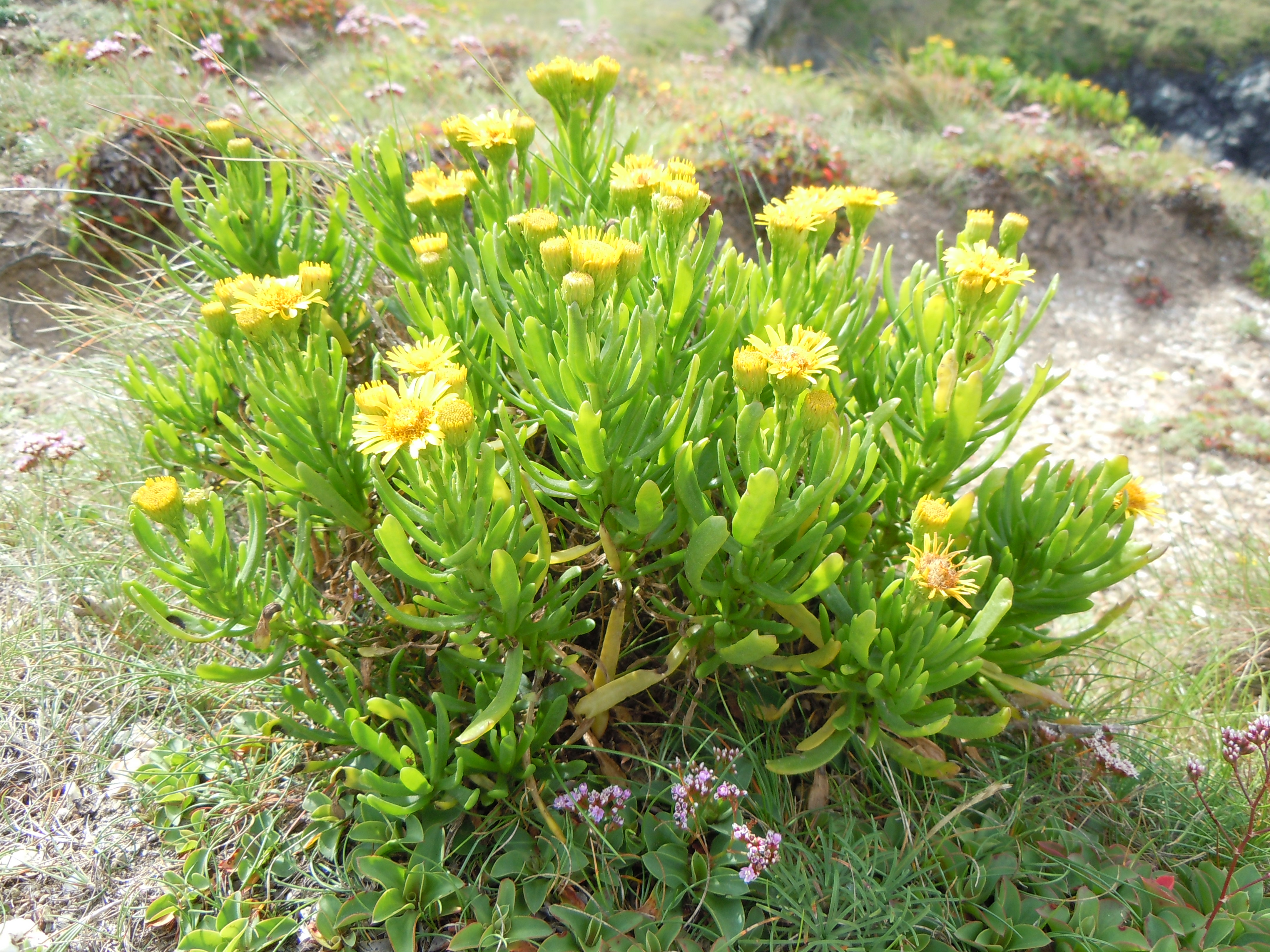 Inule fausse criste : Limbarda crithmoides syn. Inula crithmoides à Belle-Île-en-Mer